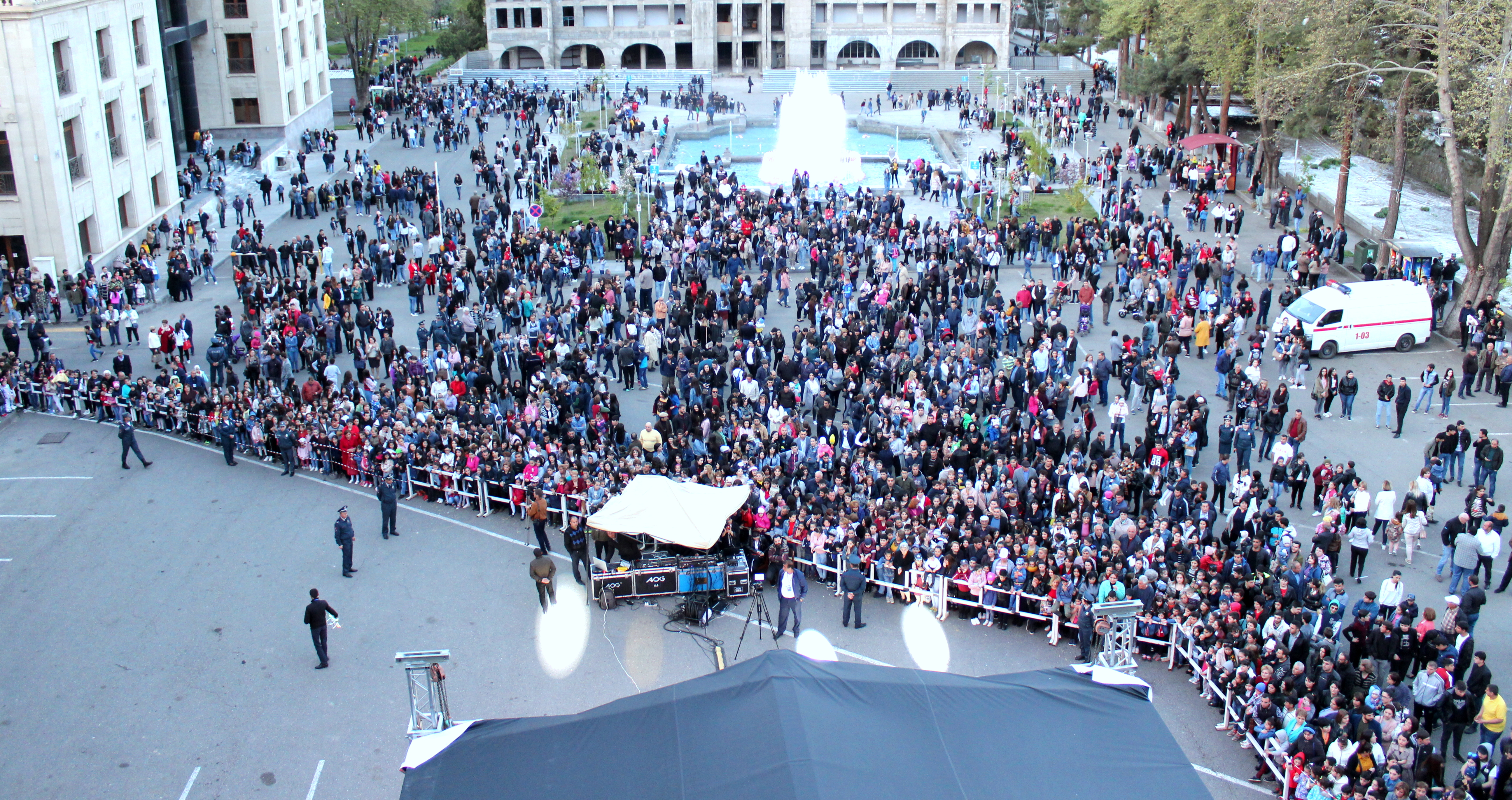 Հայաստանի Հանրապետության քաղաքացու օր, քաղաք Կապան